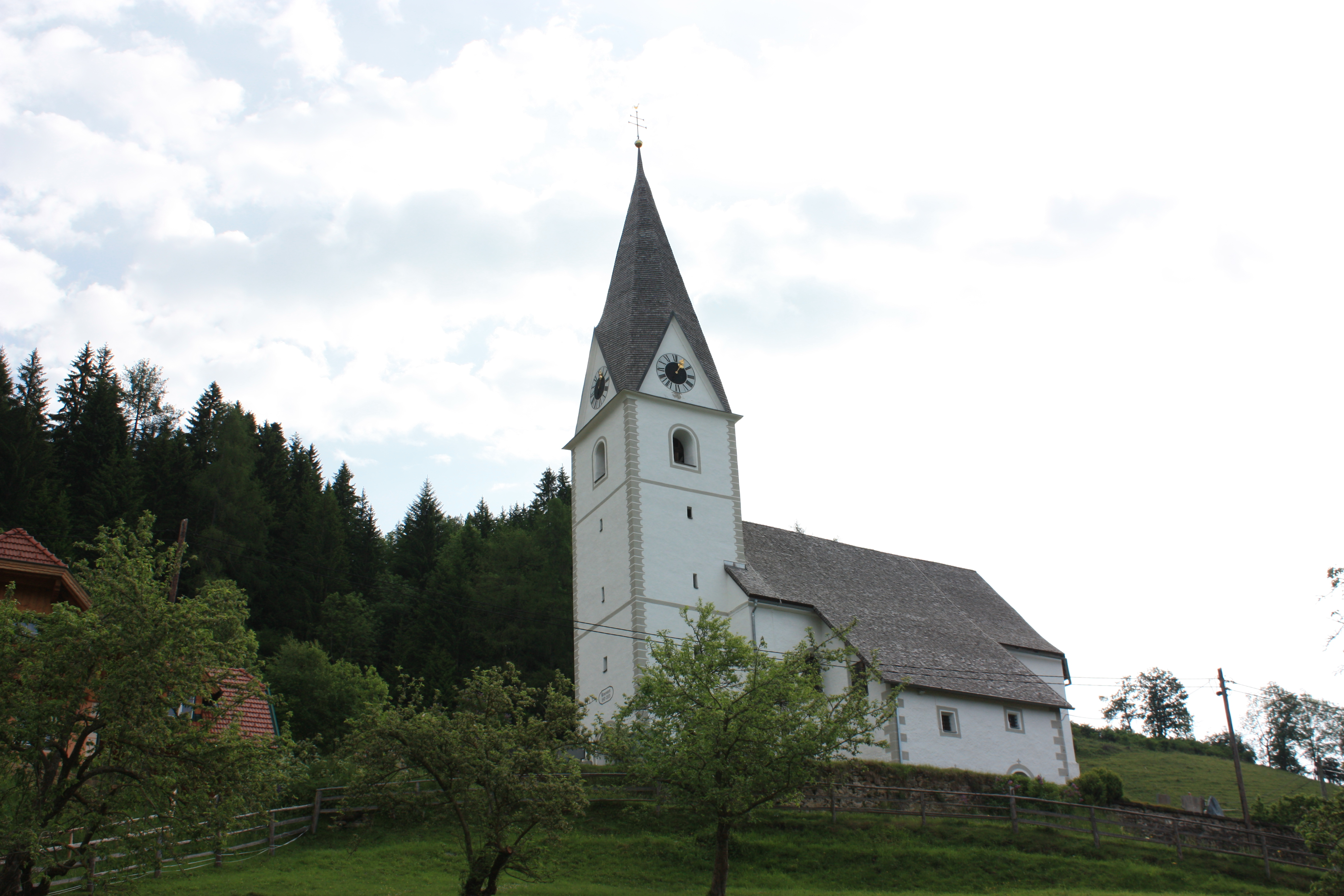 Kath. Pfarrkirche hl. Margaretha mit ummauertem Friedhof, Noreia